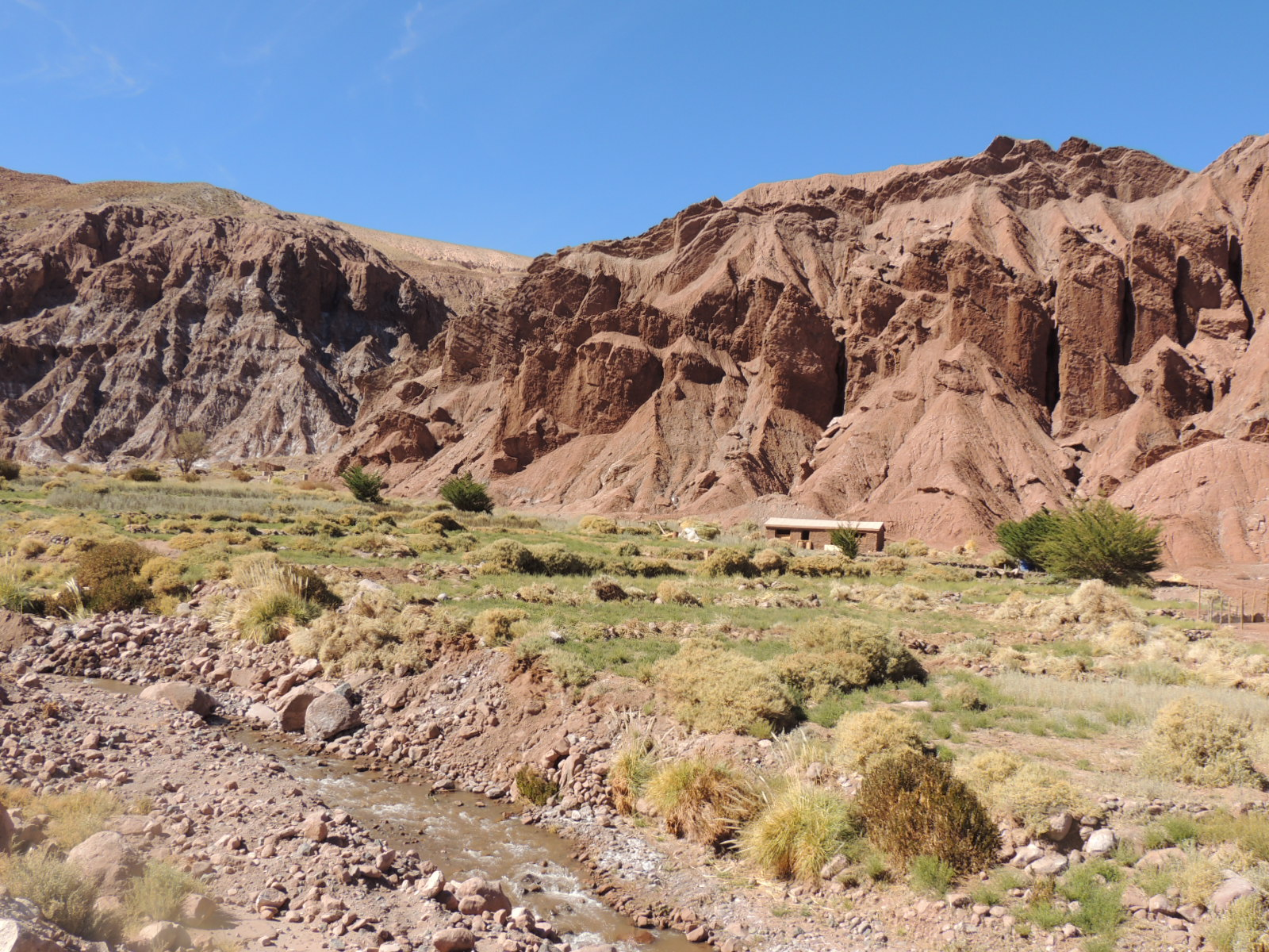 Pueblo Rio Grande y Machuca